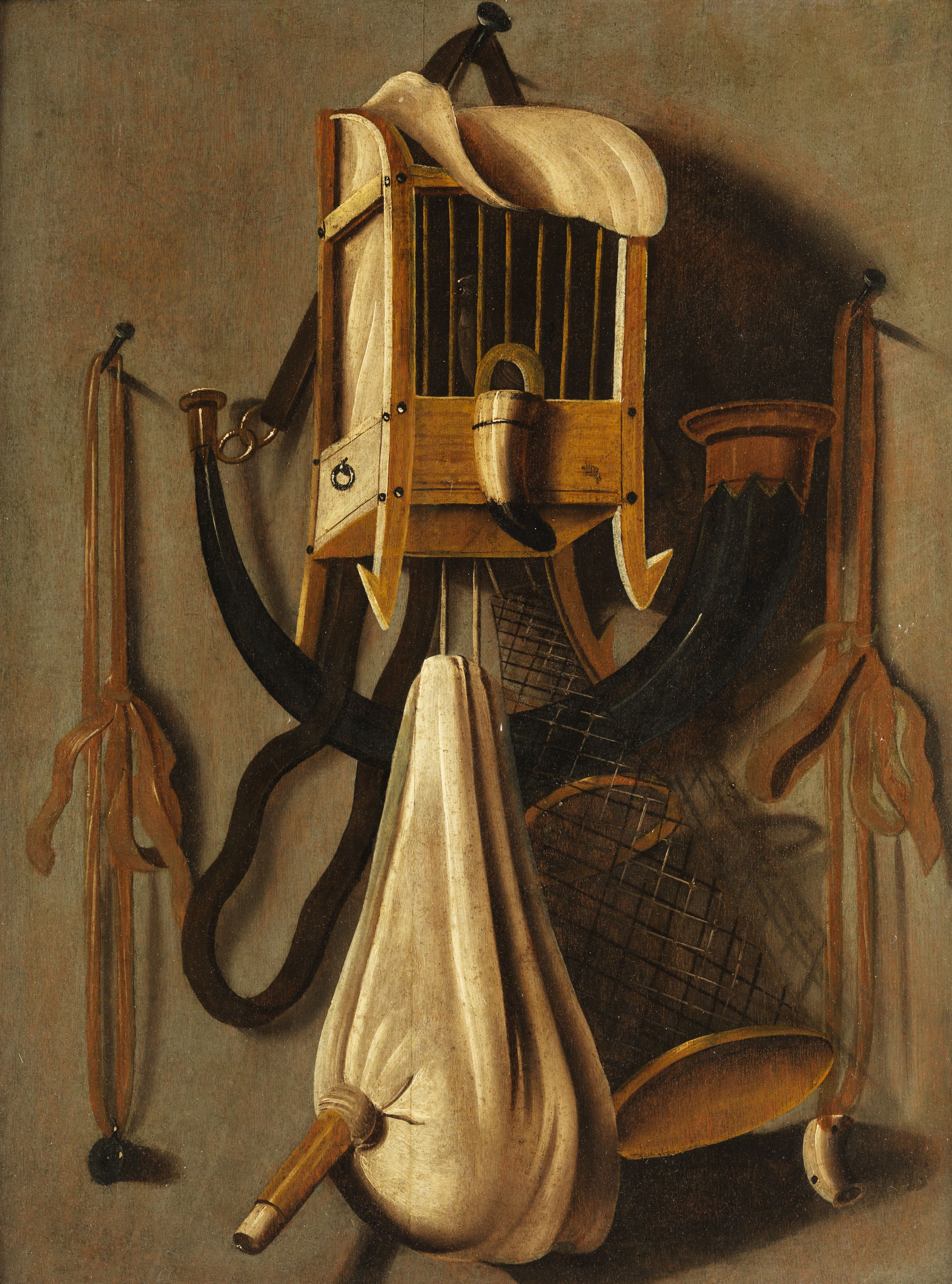 Unterschiedliche Jagd- und Fanggeräte wie Vogelkäfig, Reuse, Lockpfeifen sowie ein Jagdhorn.